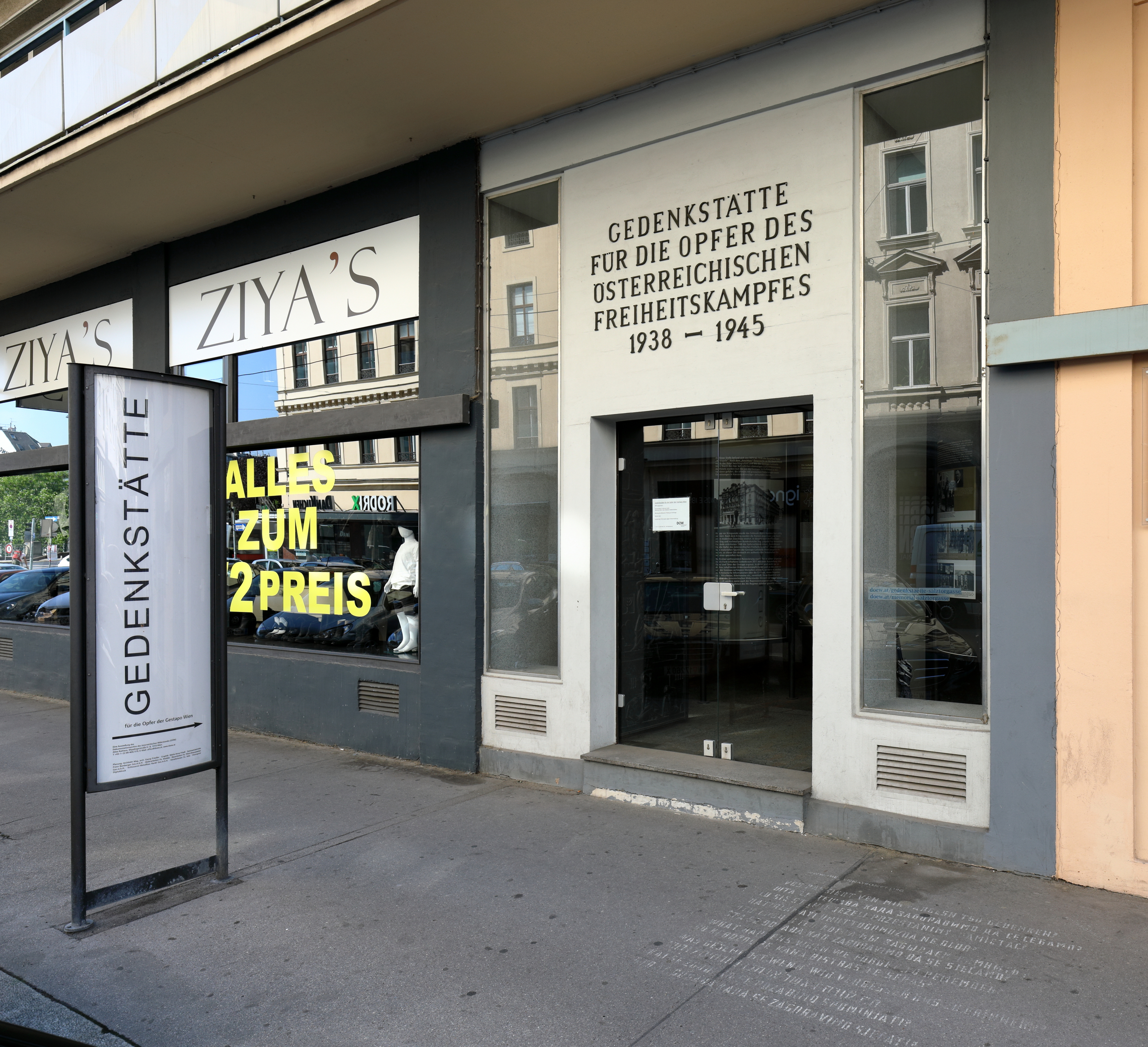 Der Eingangsbereich der Gedenkstätte für die Opfer der Gestapo an der Adresse Salztorgasse 6 im 1. Wienr Gemeindebezirk Innere Stadt. Die Gedenkstätte wurde ursprünglich von Opferverbänden 1968 als „Gedenkraum für die Opfer des österreichischen Freiheitskampfes“ eingerichtet. Nach der Renovierung und der thematischen Erweiterung durch das Dokumentationsarchiv des österreichischen Widerstandes (DÖW) erfolgte am 26. Mai 2011 die Wiedereröffnung durch den Bundespräsidenten Heinz Fischer.